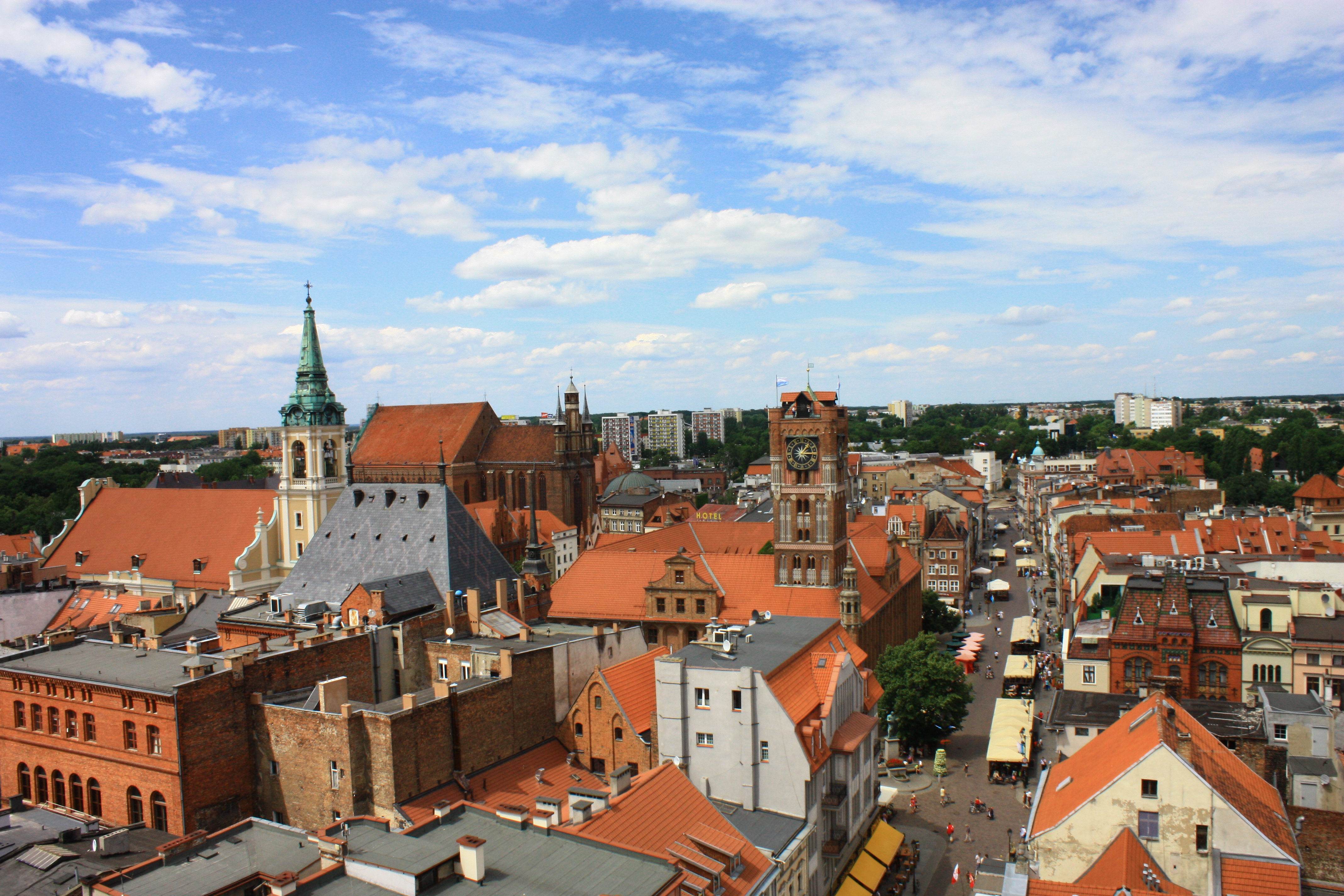 Toruń, dzielnica Starego i Nowego Miasta w obrębie murów miejskich, 1233, 1264